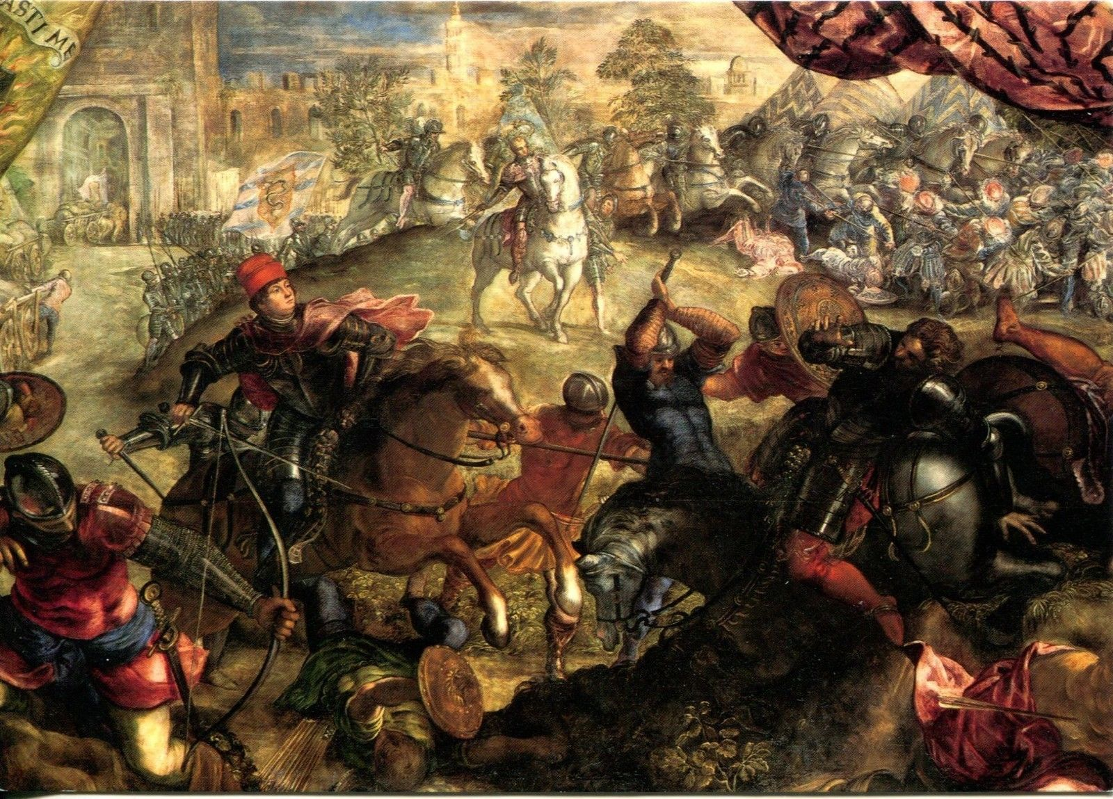 Federico I Gonzaga libera Legnano dall'assedio degli svizzeri - Olio su tela, cm. 262 × 421.5